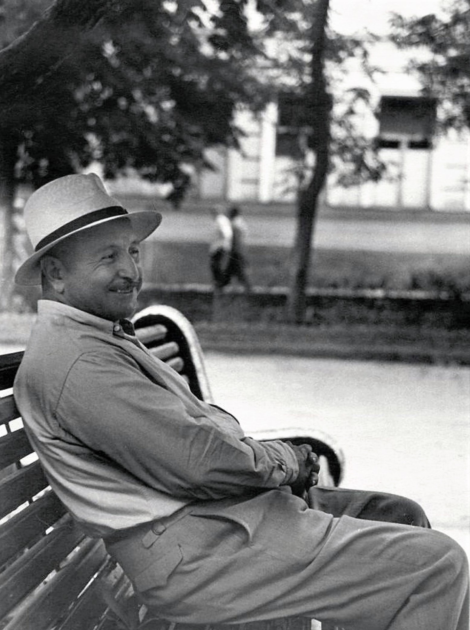 И. Баграмян на отдыхе в подмосковном военном санатории Архангельское